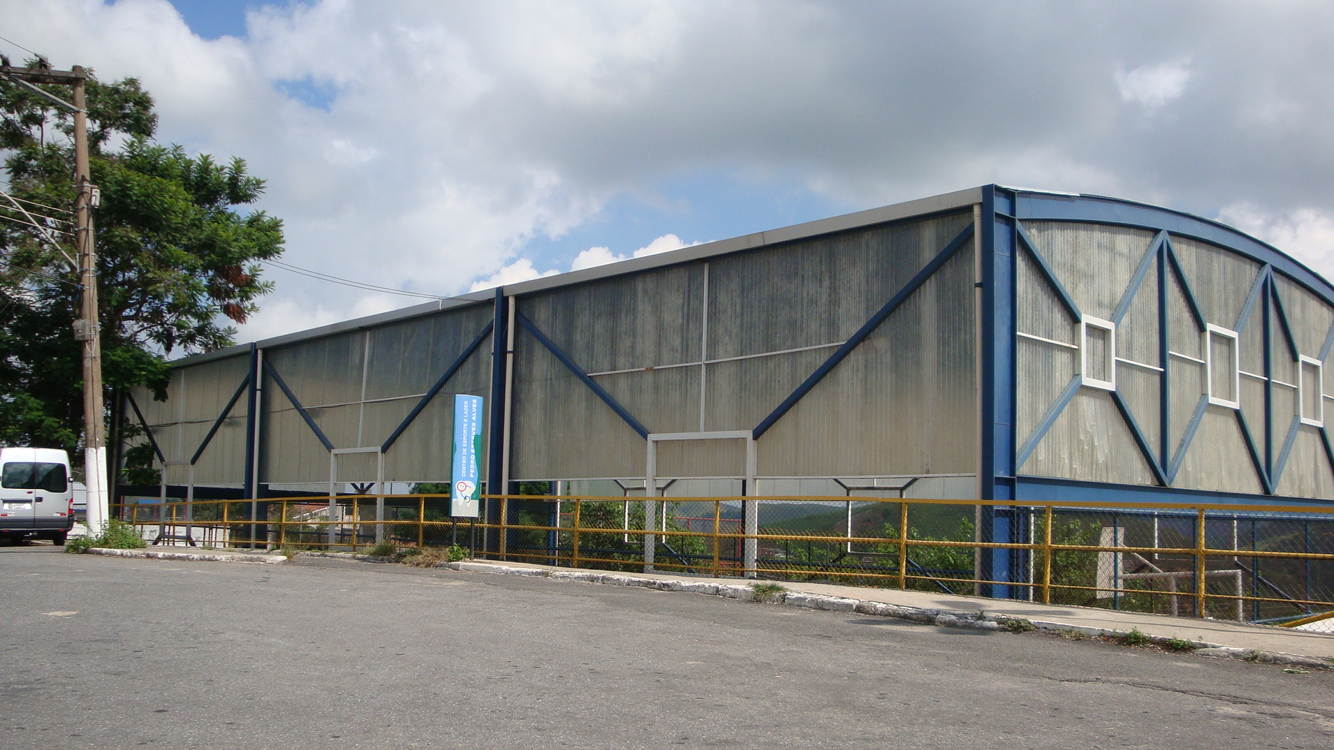 Ginasio do Mariana Torres